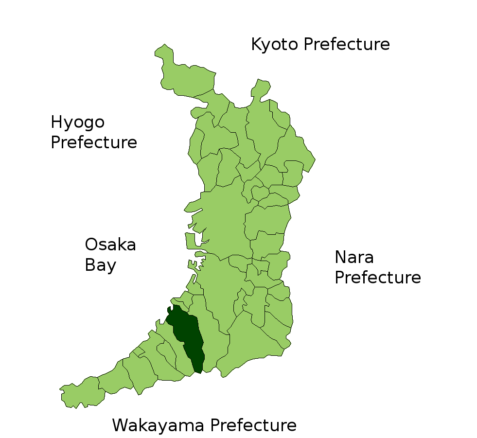 Location Map of Kishiwada in Osaka-fu, Japan